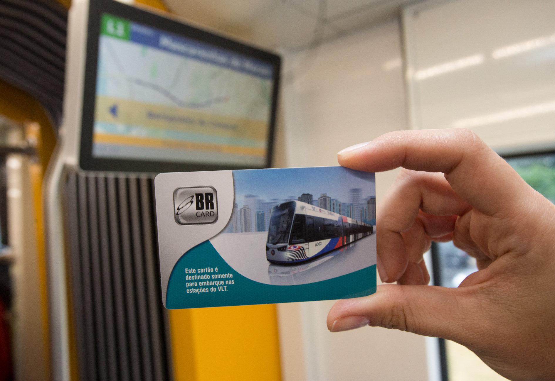 O Governador Geraldo Alckmin visitou as intervenções já finalizadas da décima estação do trecho Barreiros (Porto do VLT) e terceira do trecho santista, da Estação Bernardino de Campos. Data: 27/04/2016 Local: Santos/SP Crédito: Ciete Silvério/A2img